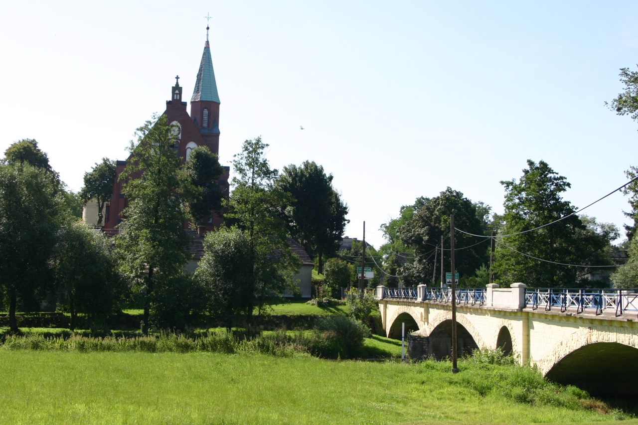 Komorniki (dodatkowa nazwa w j. niem. Komornik) – wieś w Polsce położona w województwie opolskim, w powiecie krapkowickim, w gminie Strzeleczki.